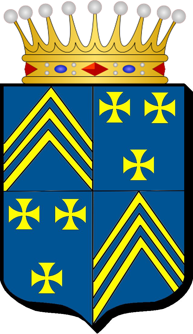 Armes de la famille de Girard, comtes de Charnacé